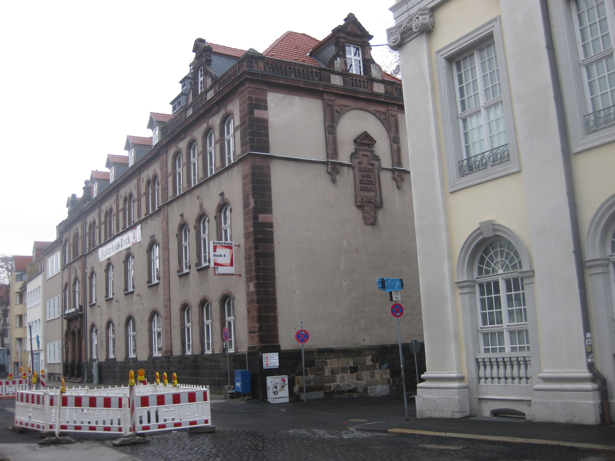 Kulturhaus Dock 4, Gebäude der ehemaligen Gerhart-Hauptmann-Schule